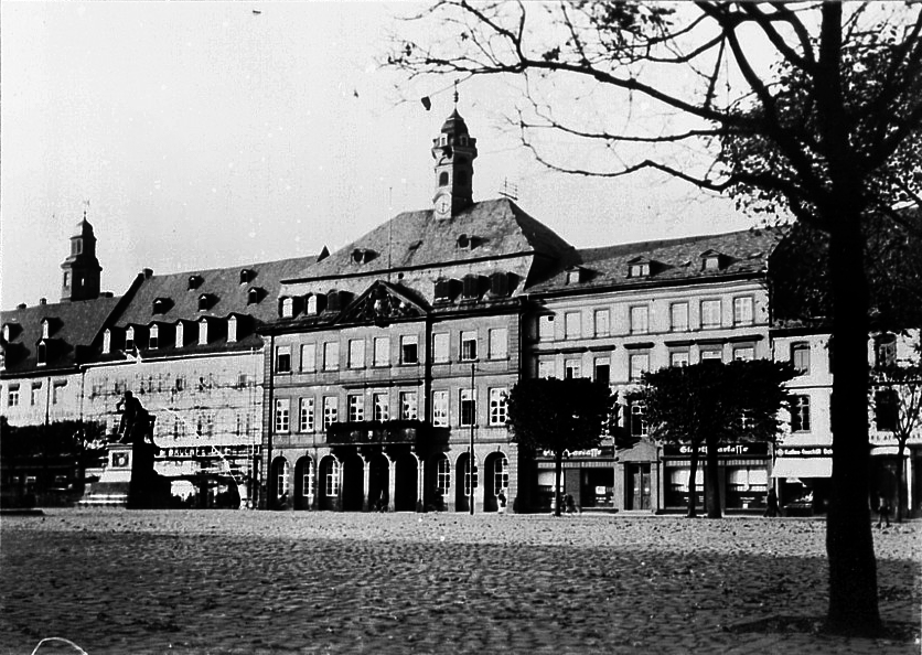 Neustädter Markt in Hanau nach Norden.